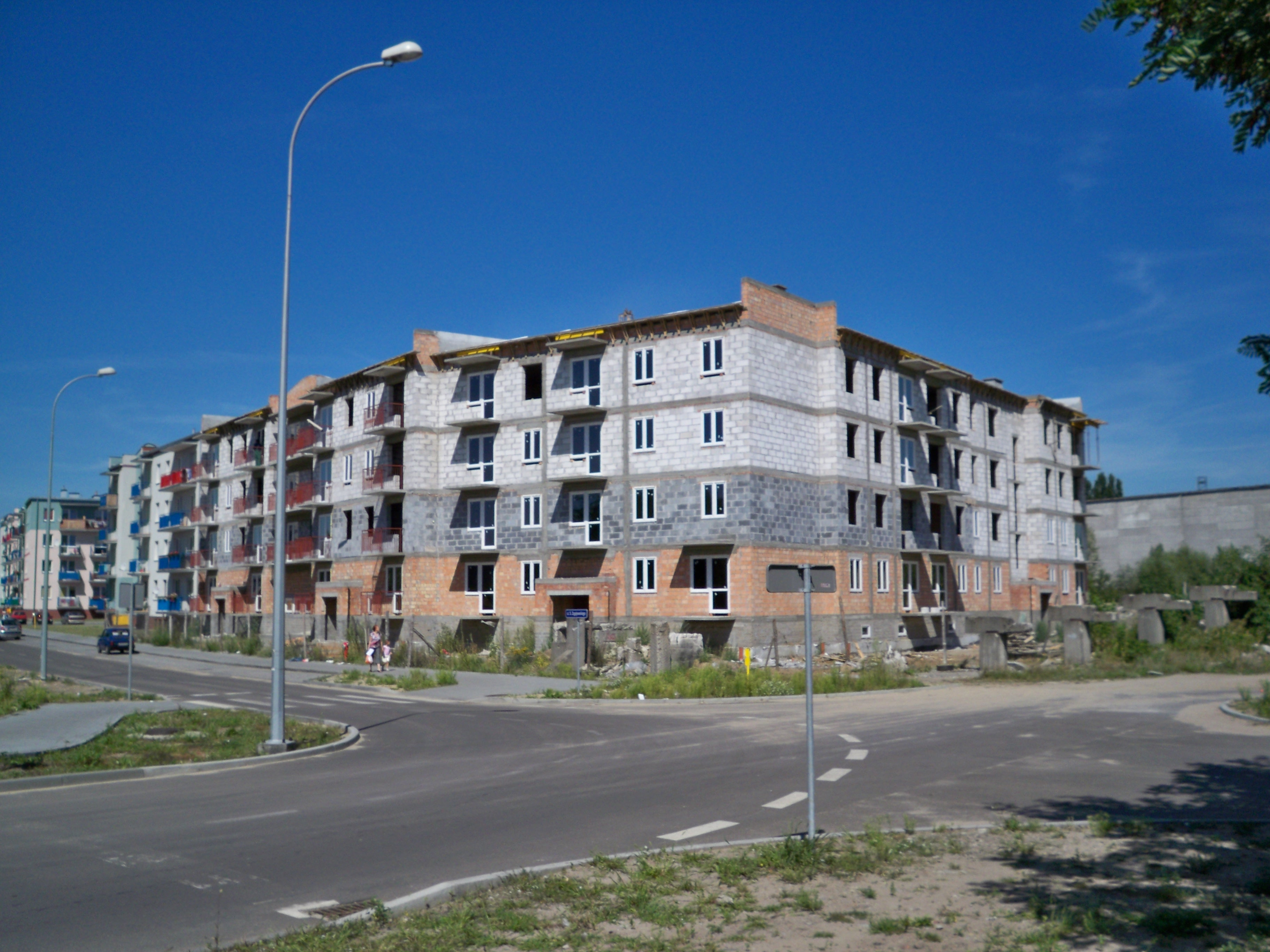 Nowy blok przy ul. Celulozowej 23A (2009 r.).